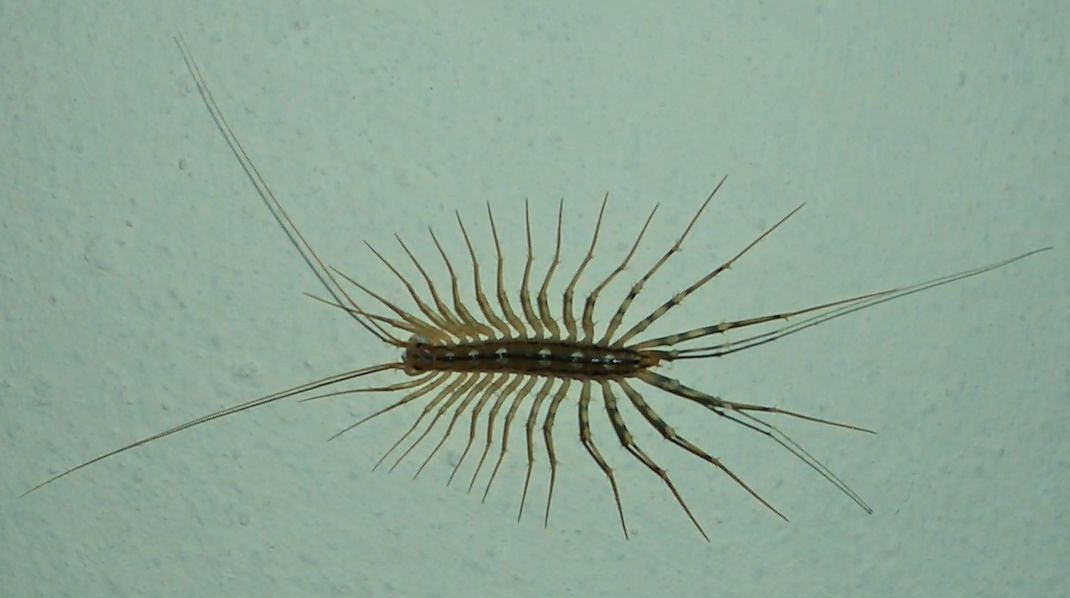 Description: House Centipede, Scutigera coleoptrata Autor: Decius Date: August 2006